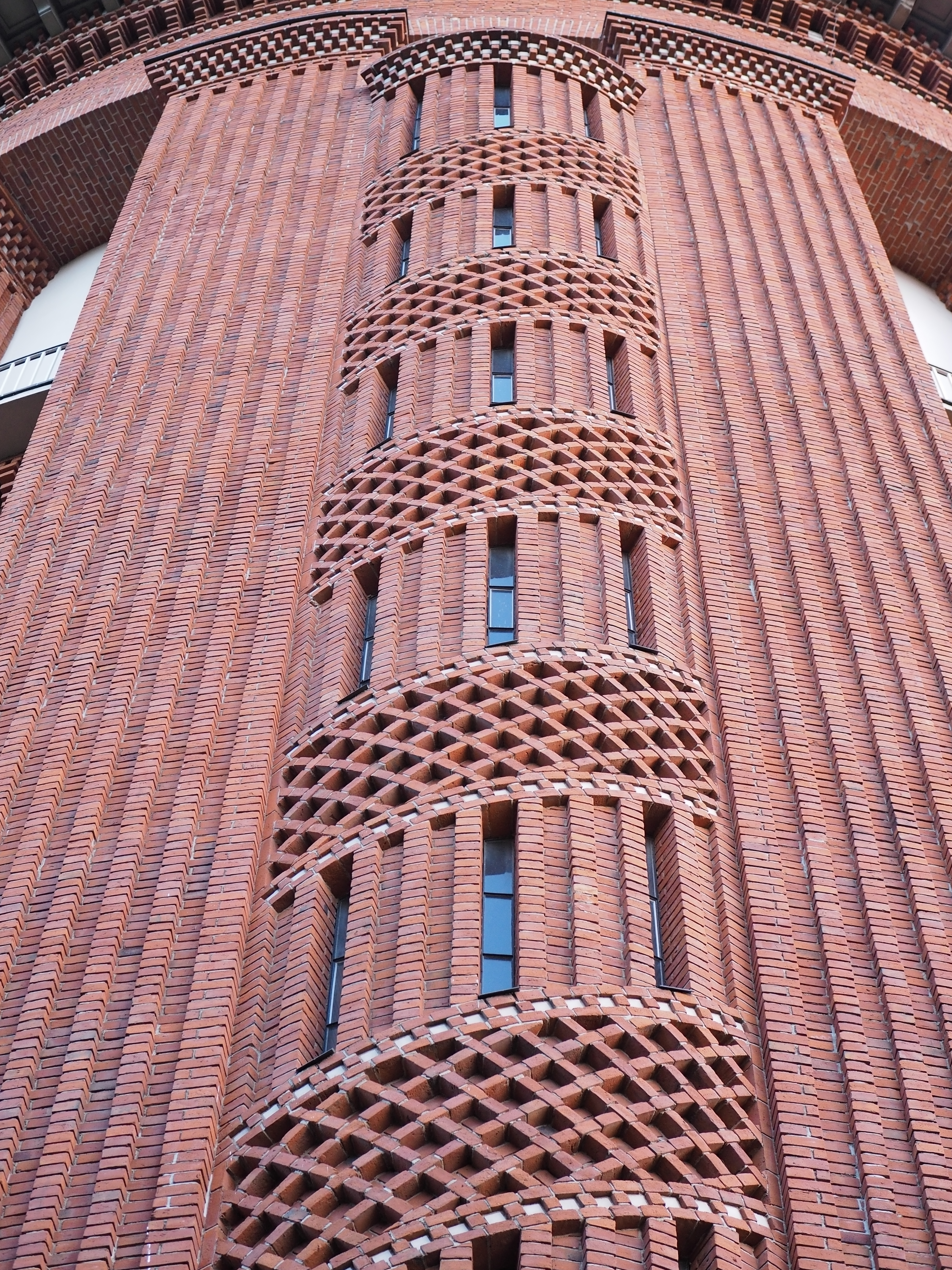 Detail der Außenfassade am Wasserturm Bergstraße 38 in Berlin-Steglitz, Denkmalliste 09065481